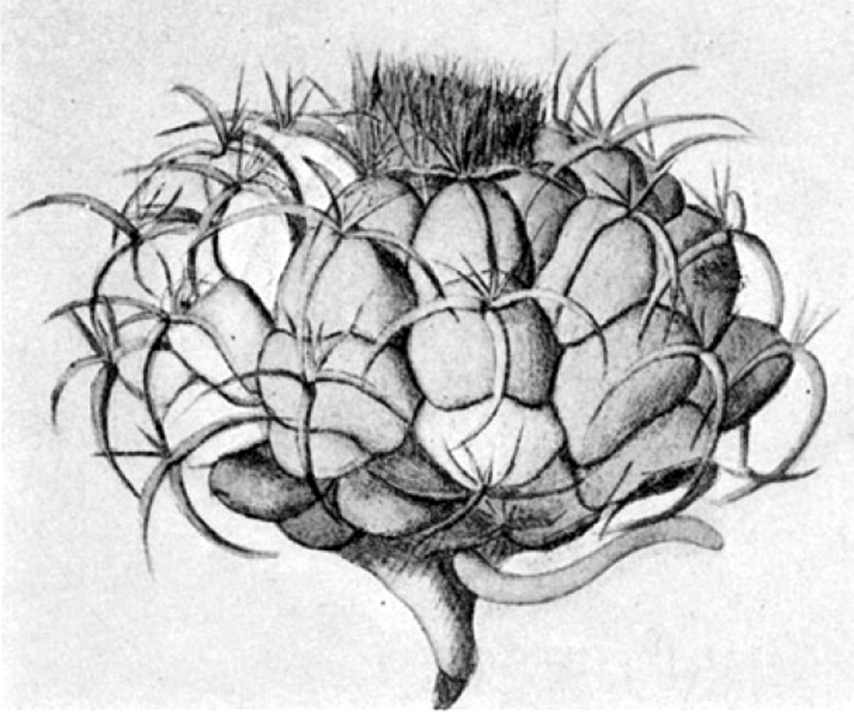 Malacocarpus heptacanthus